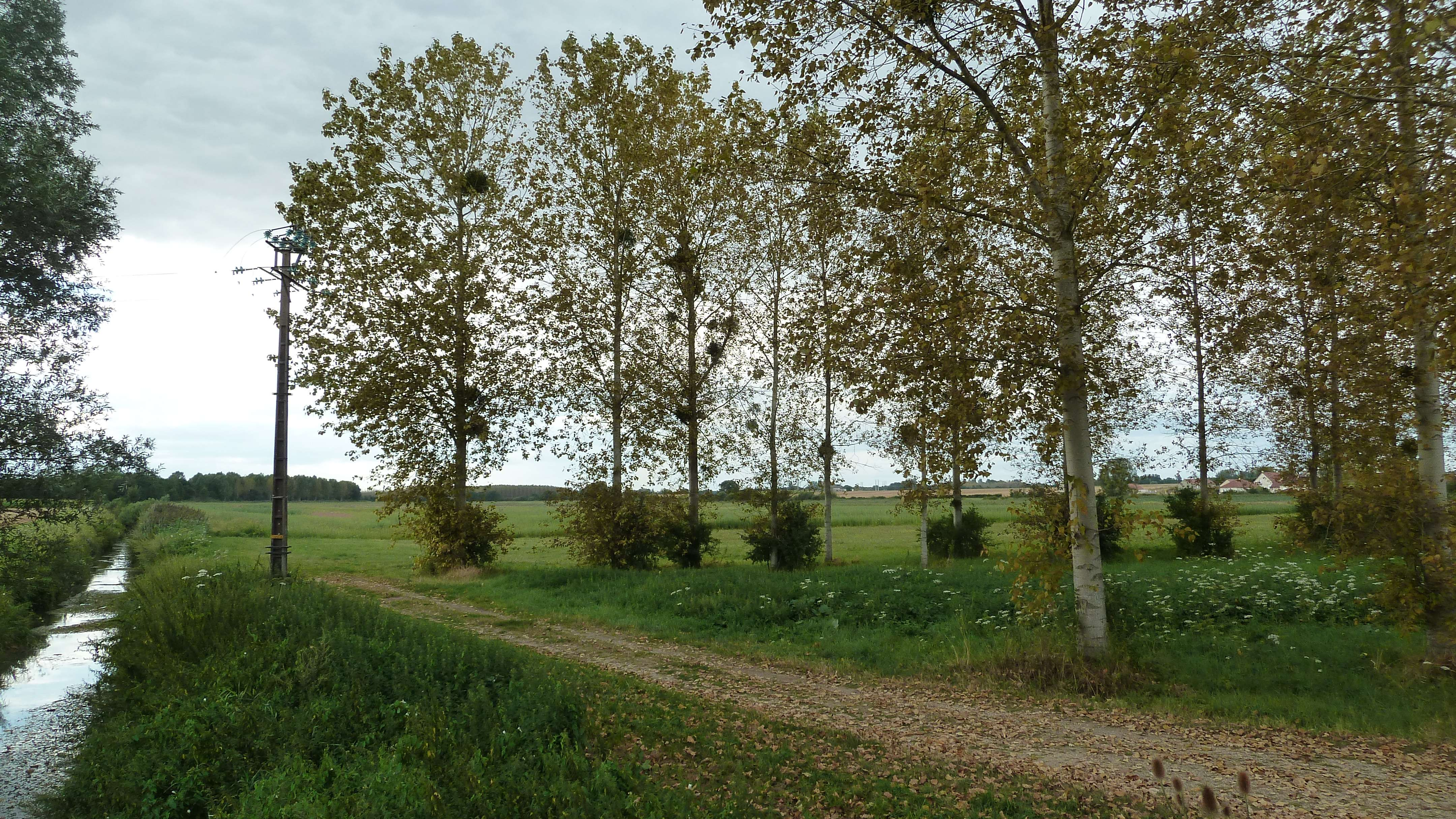 Peupleraie sur les bords de l'Albane à Saint Léger Triey.